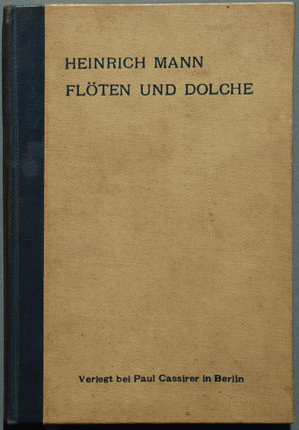 Mann, Heinrich: Flöten und Dolche. Novellen. München: A. Langen 1905, 143 Seiten. Erste Ausgabe (Wilpert/Gühring² 12)